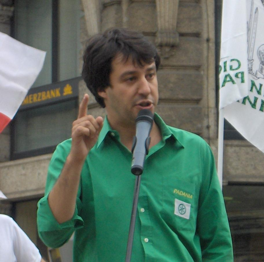 Matteo Salvini parla durante la manifestazione dei Giovani Padani a Milano.